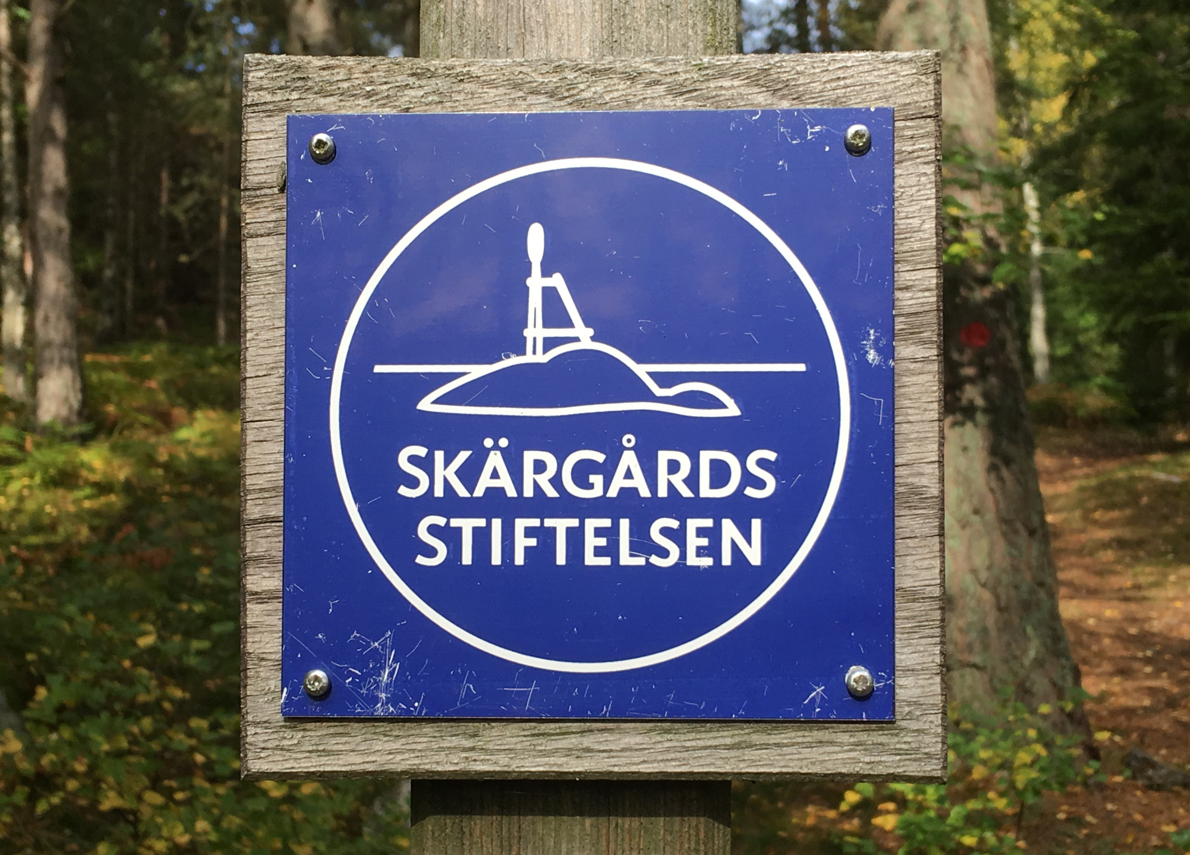 Skärgårdssiftelsens skylt i Gålö naturreservat